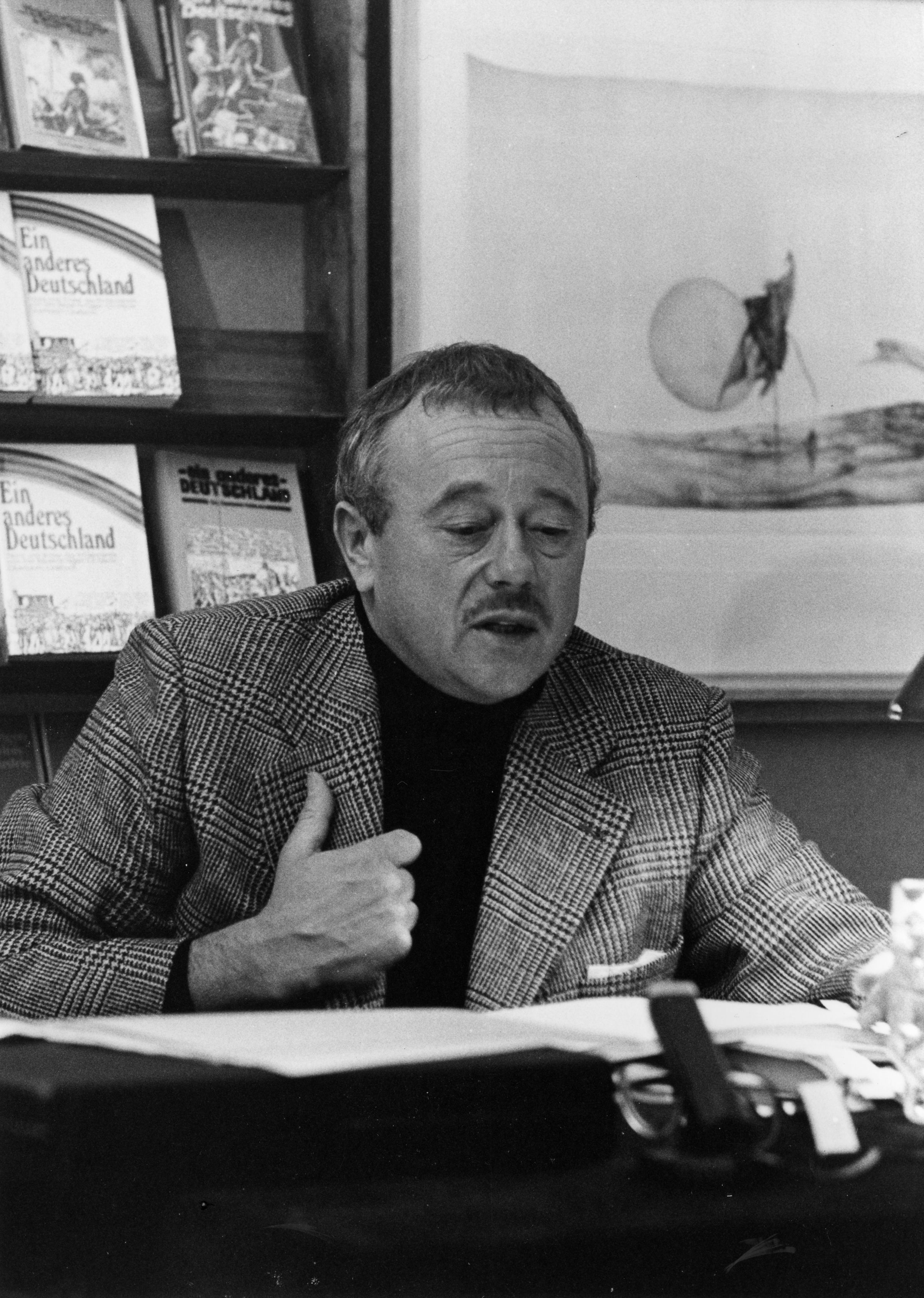 Roger Loewig auf einer Lesung